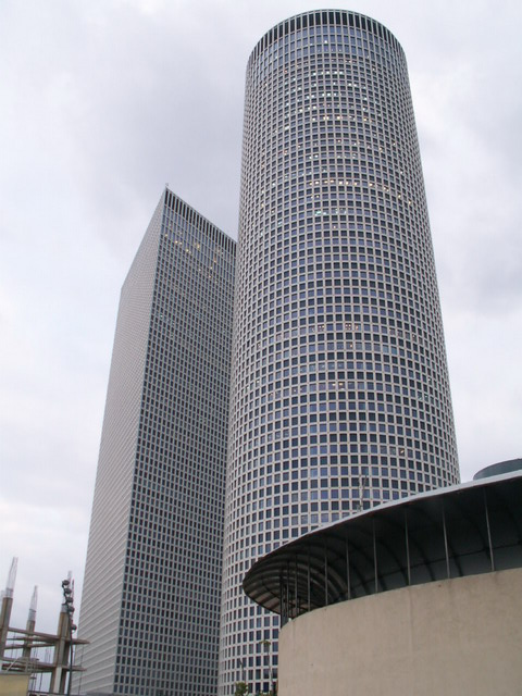 מרכז עזריאלי ת"א Azriely Towers - Tel-Aviv - Israel צולם על-ידי אבי קדמי ב- 2006.